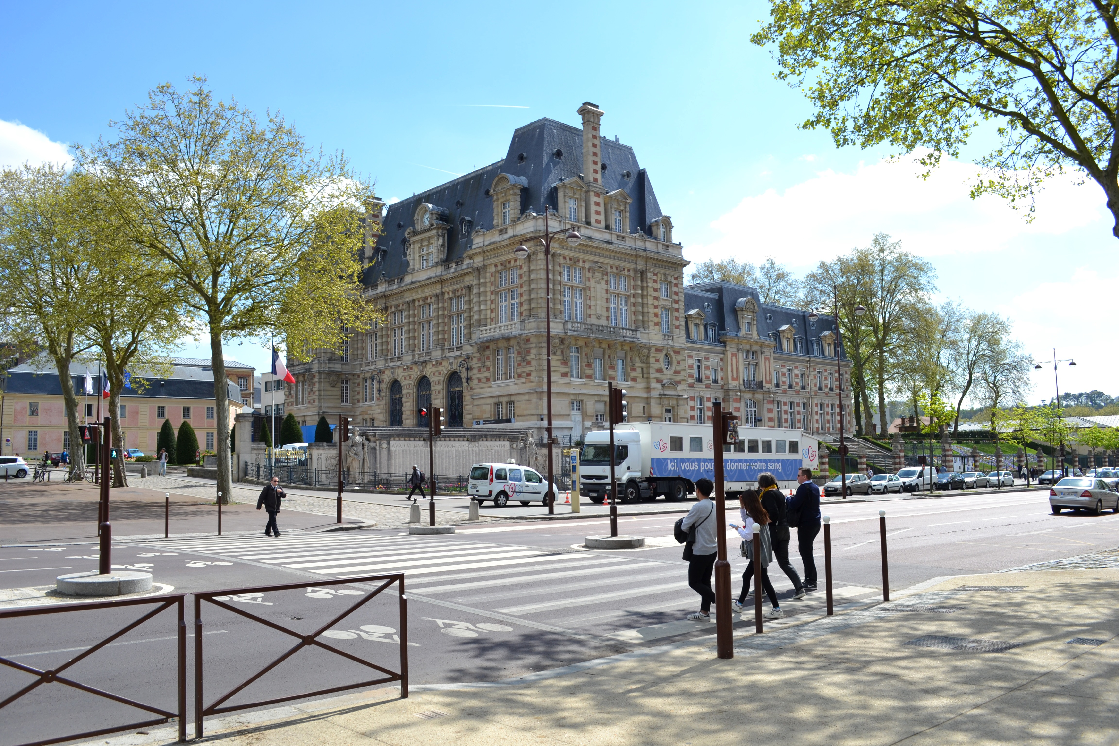 L'hôtel de ville' de Versailles, dans les Yvelines (France).